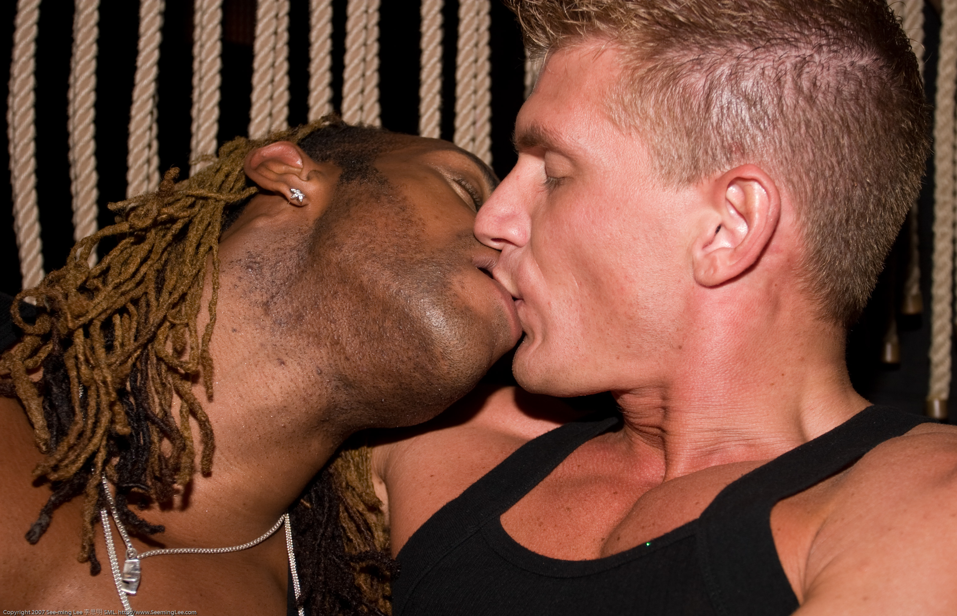 SML Flickr Tags: Gay SML Flickr Tags: Ideal Husbands SML Flickr Tags: Kiss SML Flickr Tags: Life SML Flickr Tags: Marlone Star SML Flickr Tags: Men CC-BY-SA 2007 See-ming Lee (Blog / Gay Blog / Photo Blog / Wiki)